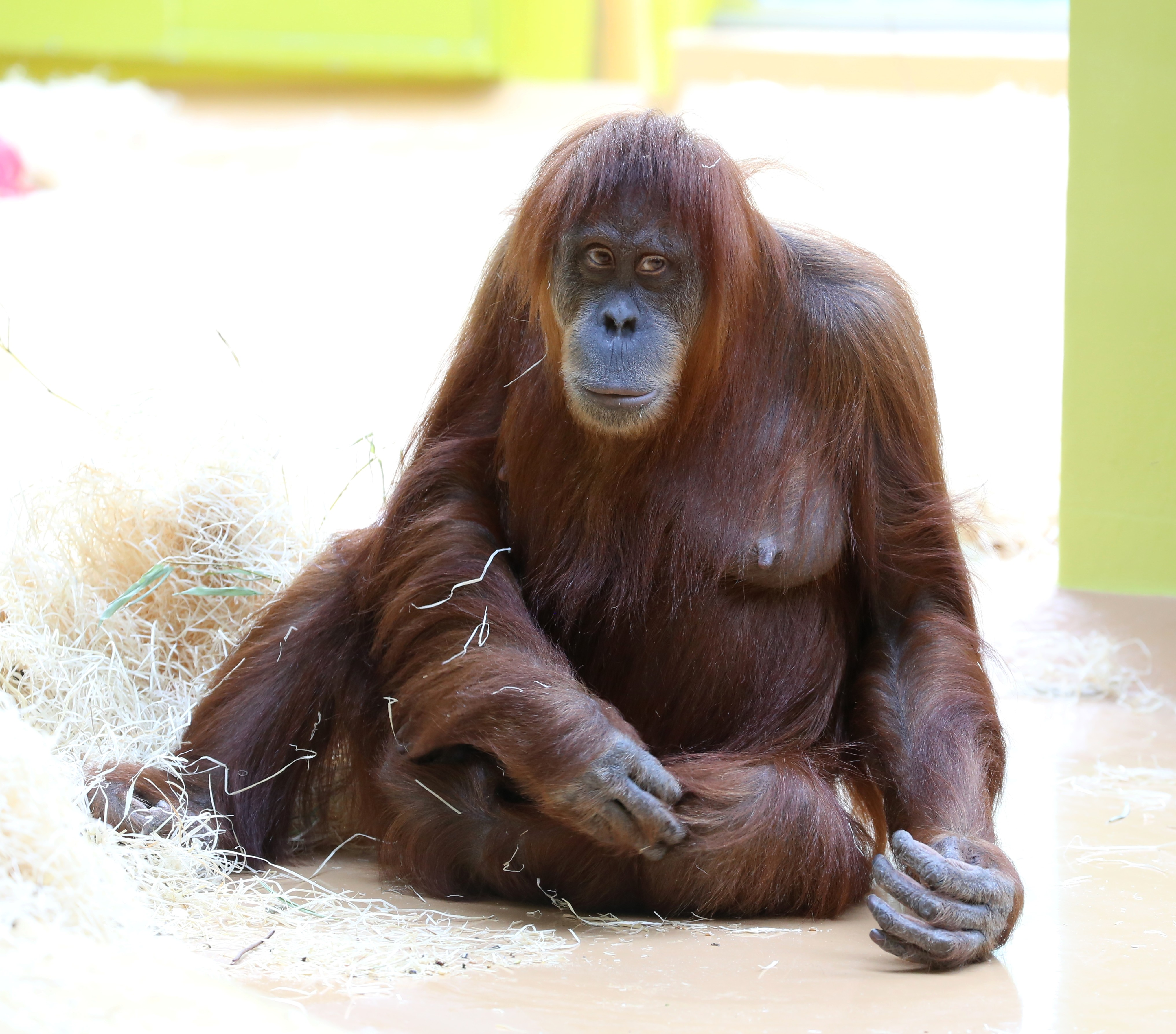 Tierpark Hellabrunn, München Sumatra-Orang-Utan (Pongo pygmaeus abeli), Tierpark Hellabrunn, München